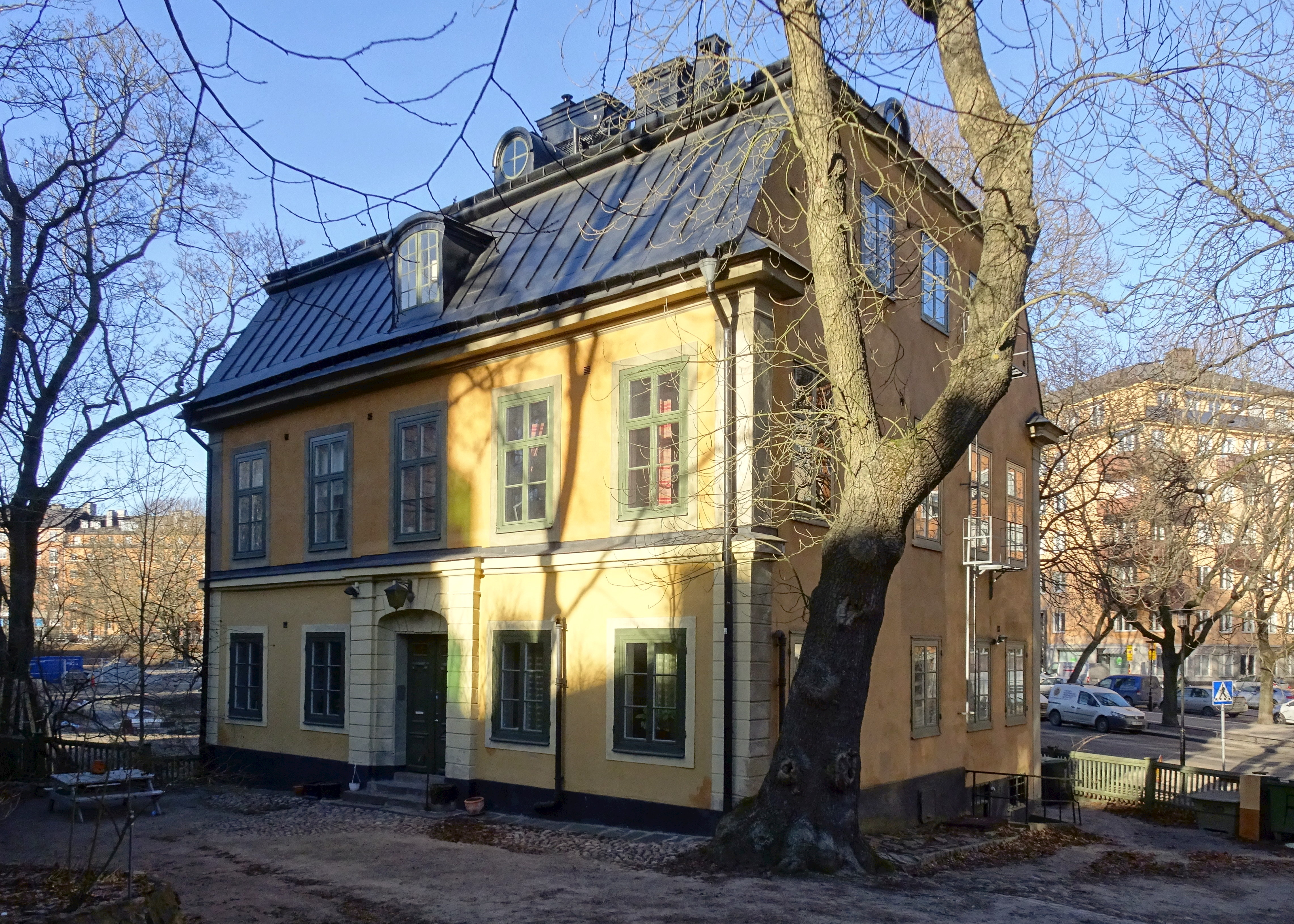 Lilla Blecktornet vid Katarina bangata